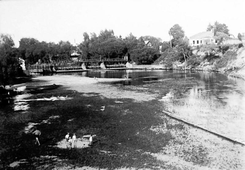 Izidoriaus Girčio fotografijoje Okuličiūtės dvarelis 1965 m.